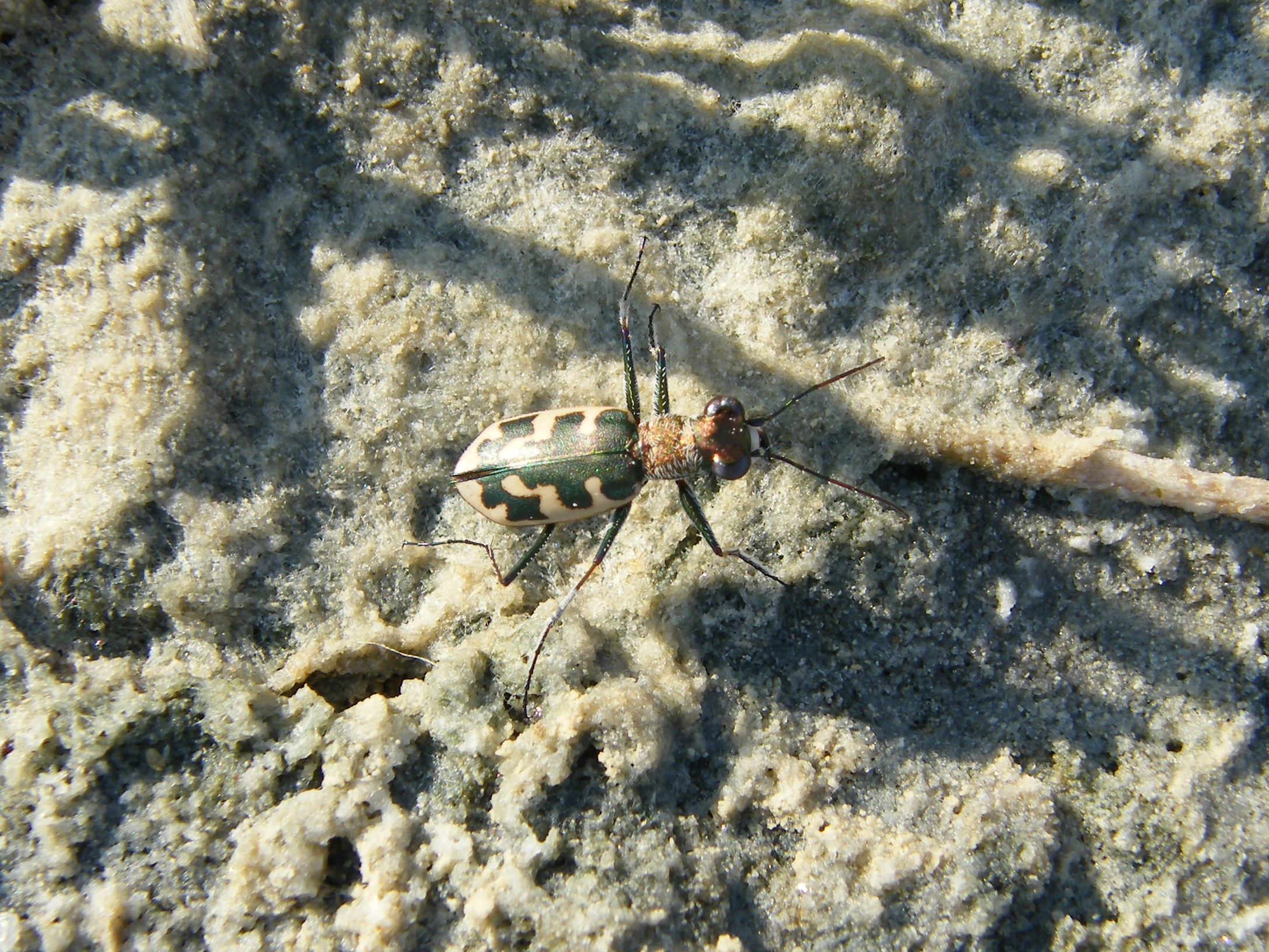 Cephalota litorea goudotiSaline di Cagliari